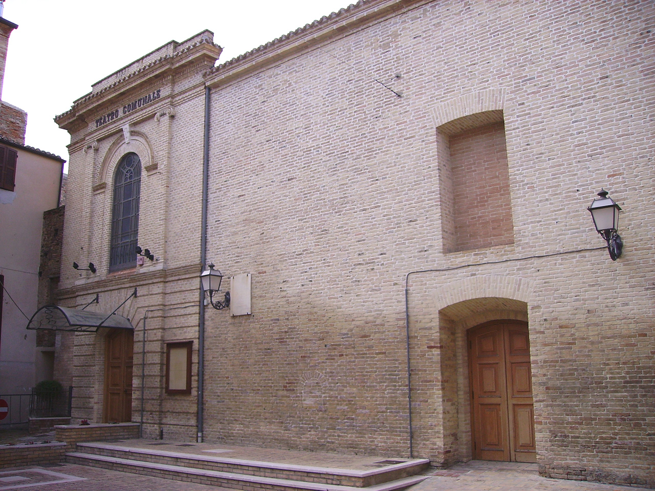 Città Sant'Angelo (PE), teatro comunale